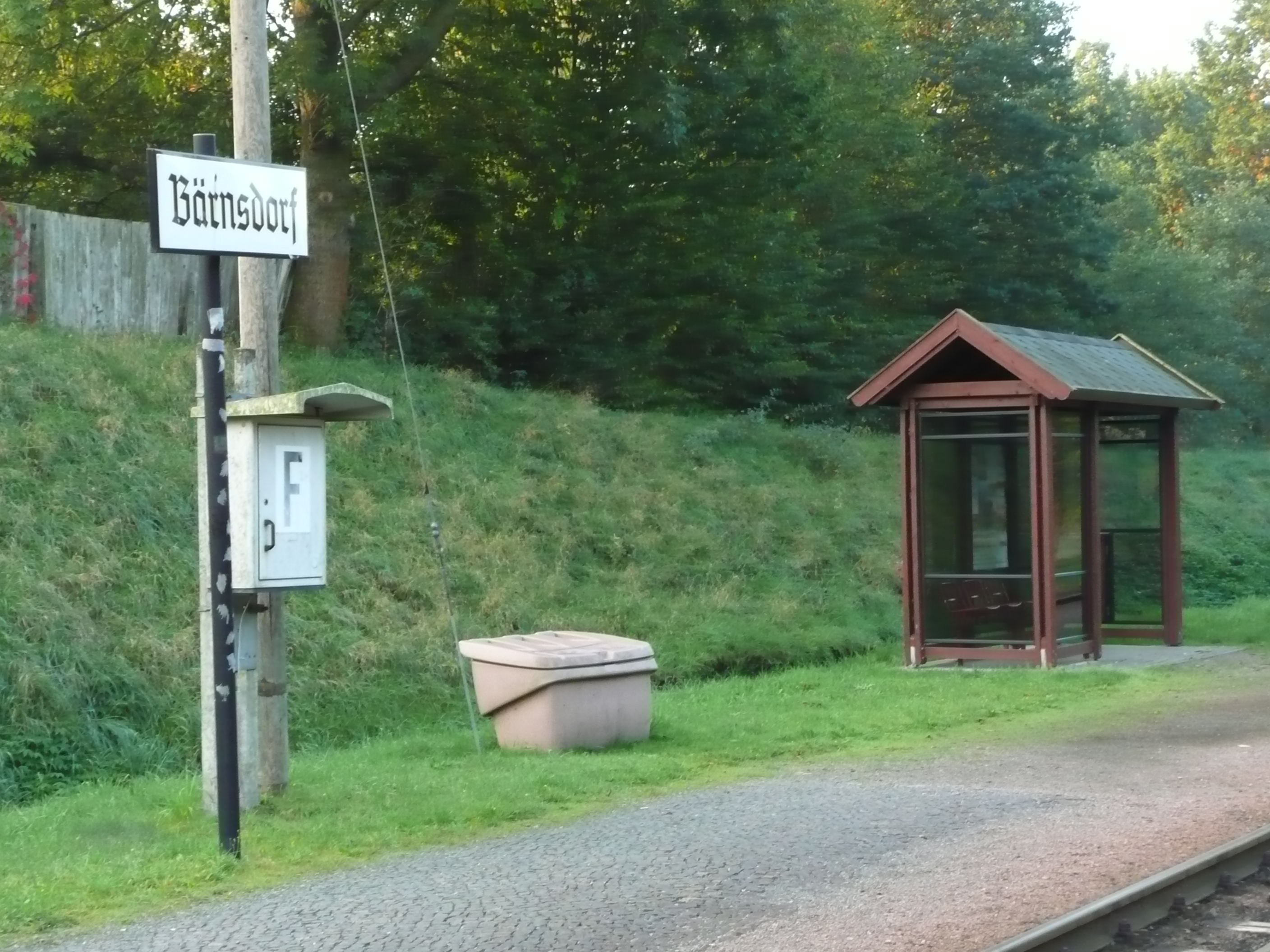 Bahnstation Bärnsdorf